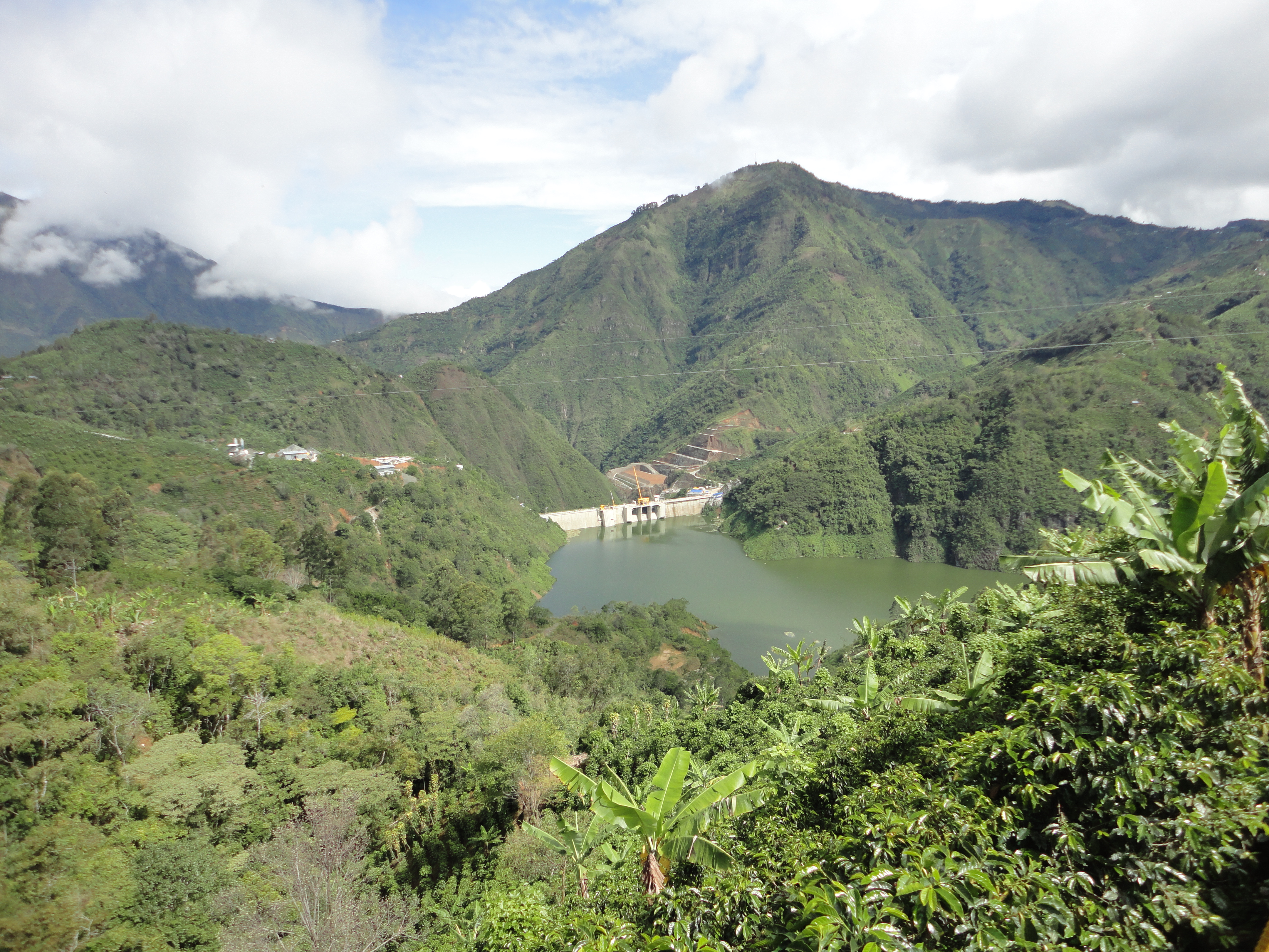 Embalse y Represa de la Planta Hidroeléctrica Pirrís